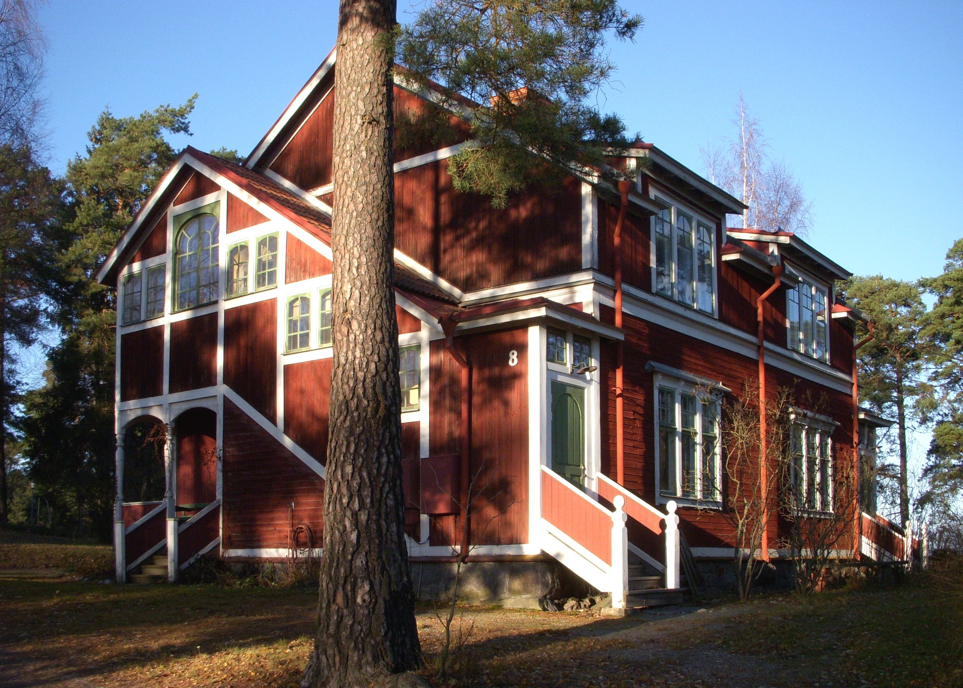 Bostadsområdet "Draget" vid Norsborgs vattenverk